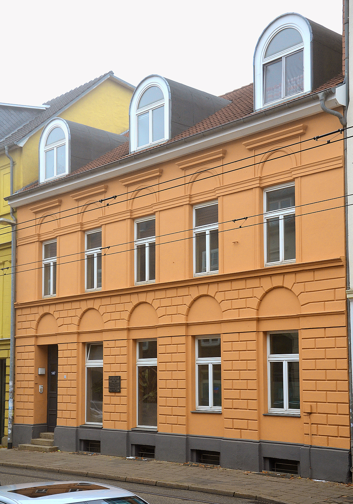 Das denkmalgeschützte Gebäude Wismarsche Straße 147 (Achtung: falsche Hausnummer im Dateititel), das ehemalige Wohnhaus des Historikers Friedrich Lisch nahe dem Hauptbahnhof in Schwerin, dort aufgenommen am 2. November 2015 nach dem von verschiedenen Wikipedianern veranstalteten Arbeitstreffen Wikipedia:WikiDACH 2015 im Schweriner Schloss ...